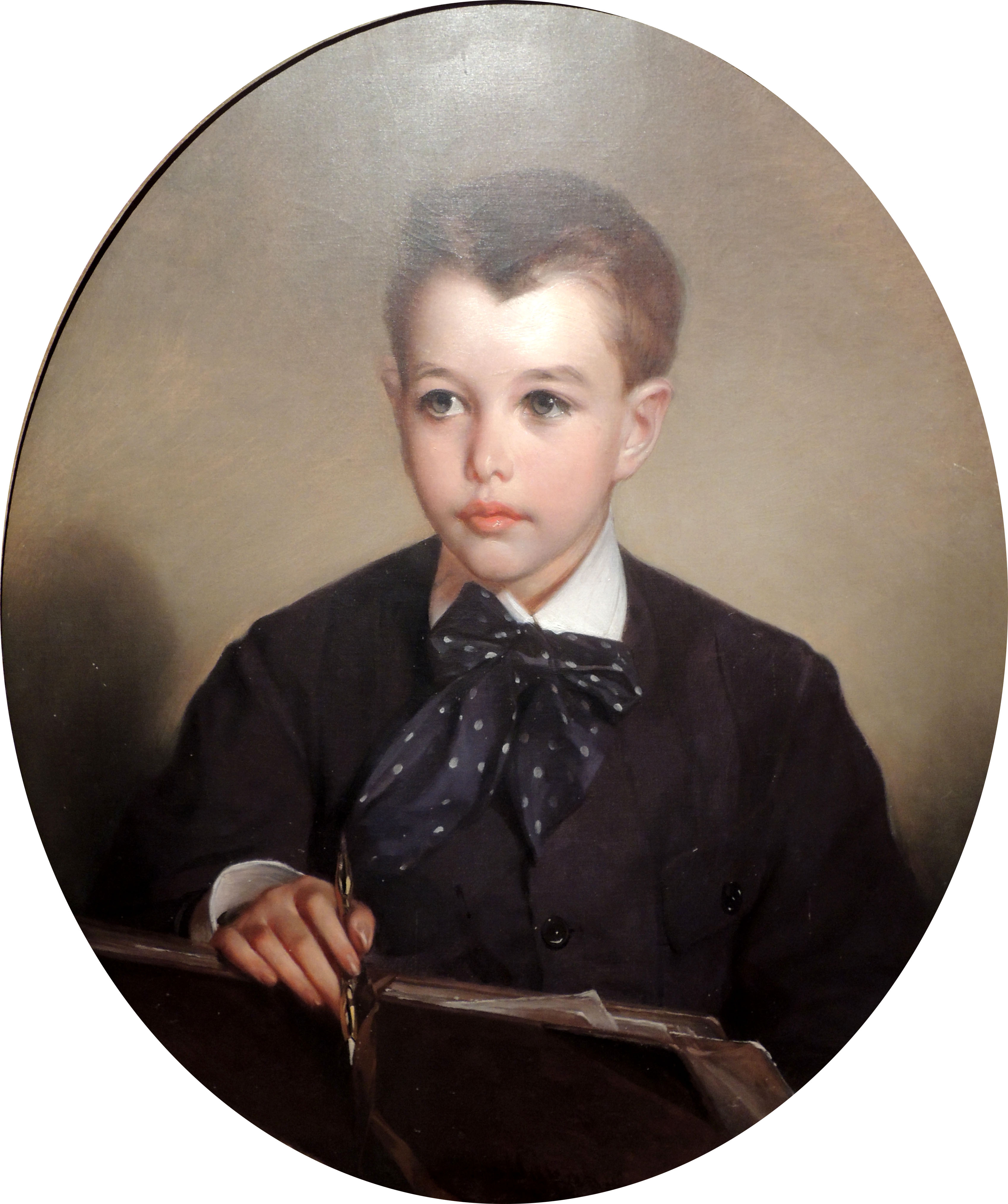 Иван Макаров. Портрет графа Павла Сергеевича Шереметева (1871-1943) в детстве, 1880-е. Музей Останкино.